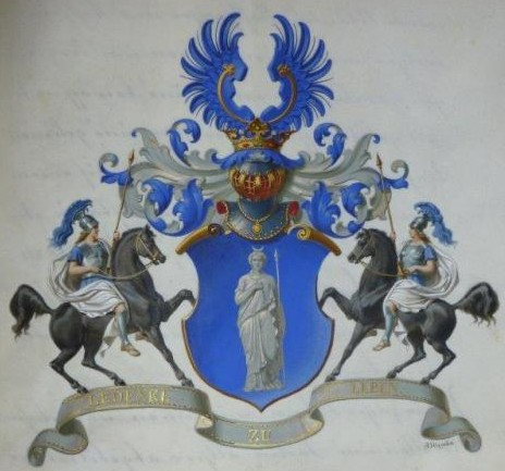 Wappen der Familie von Laue, Adelung am 01.01.1858 durch Wilhelm I